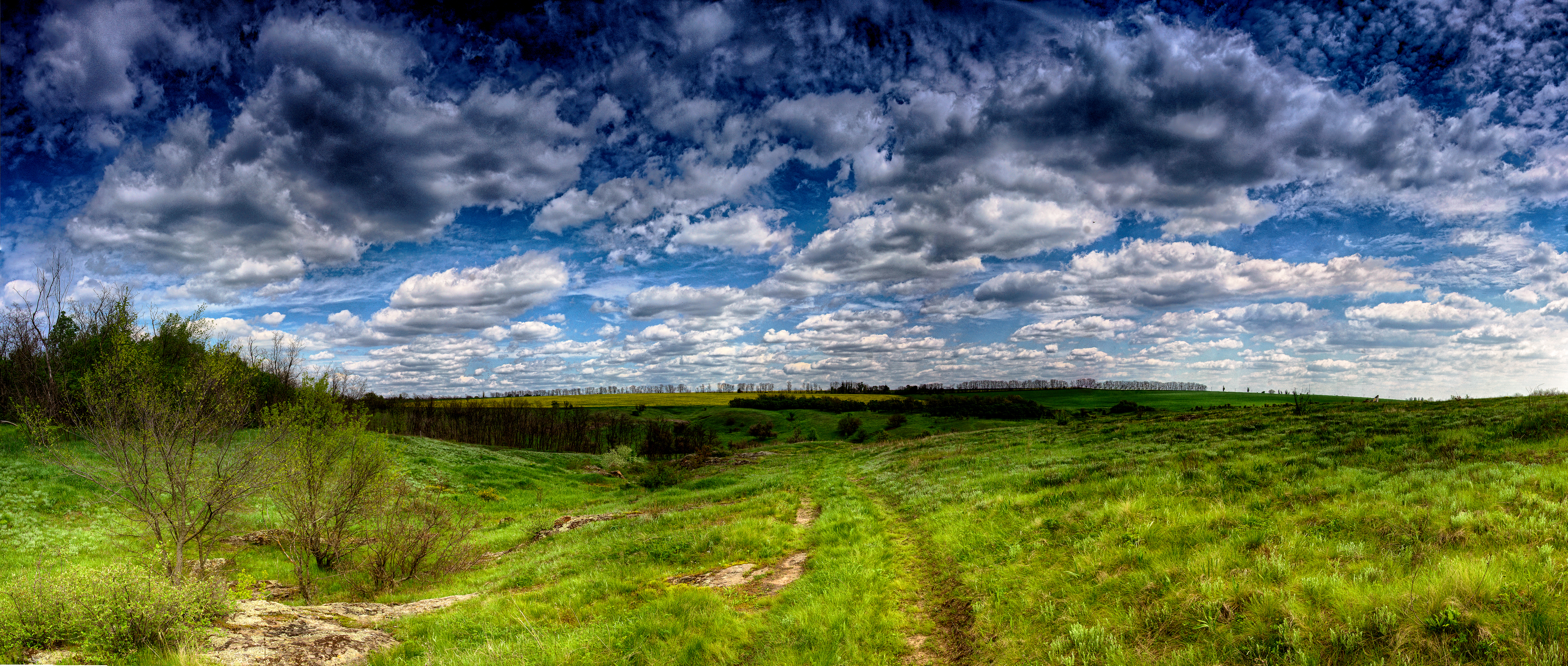 «Цілинна балка Вербова», Вільнянський р-н, околиця с.Георгієвка